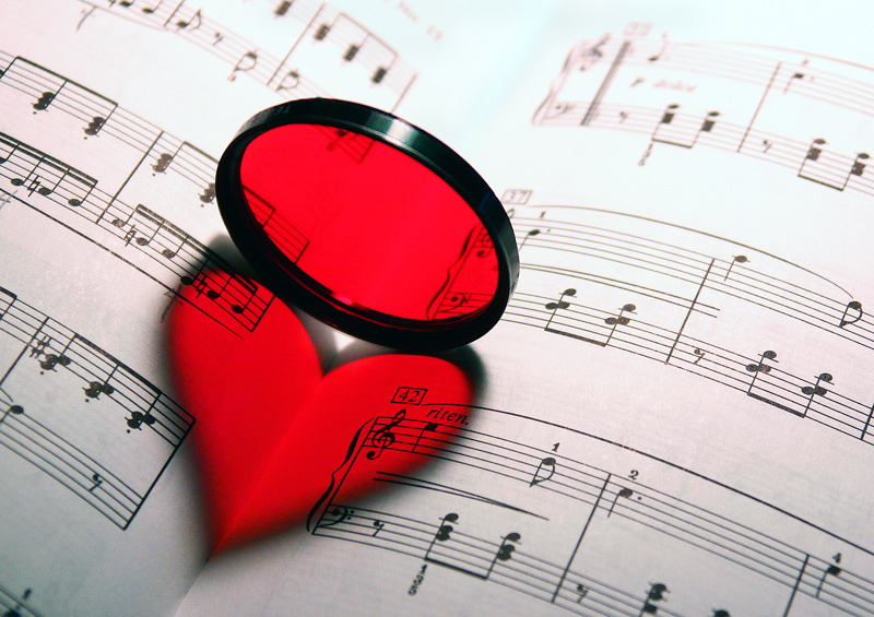 Love for Arts